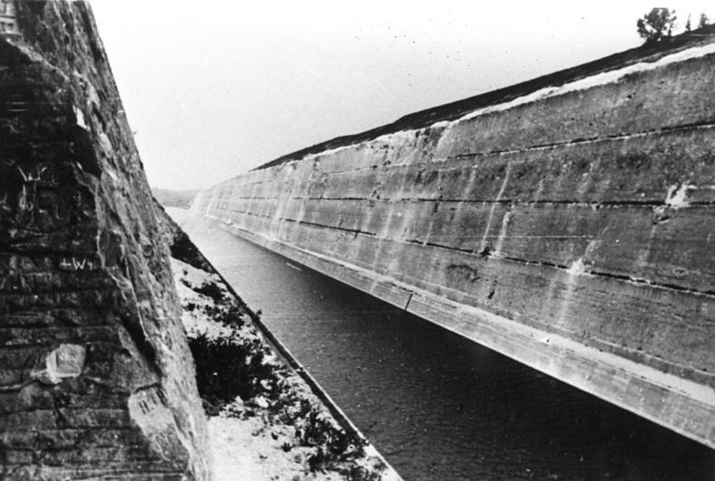 Heeresfilmstelle Bildarchiv Westwall. Der Albert-Kanal von einem MG-Stand des Forts Eben Emael gesehen. Aufnahme am: 23.05.40 Ort: Eben Emael, Belgien Bildberichter: Kliem Negativ Nr. P.K 1/1